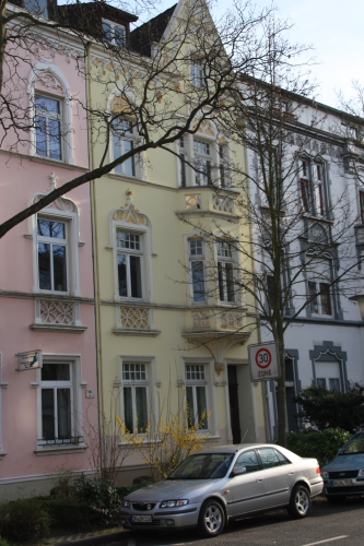 Das Haus Malteserstr. 9 in Düren (gelb)